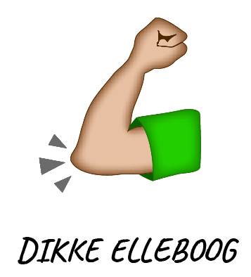 ellebooggroet